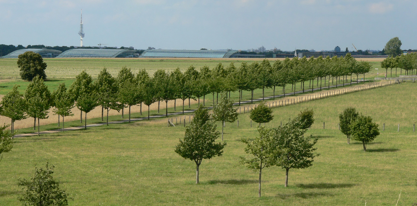 Kronsberg